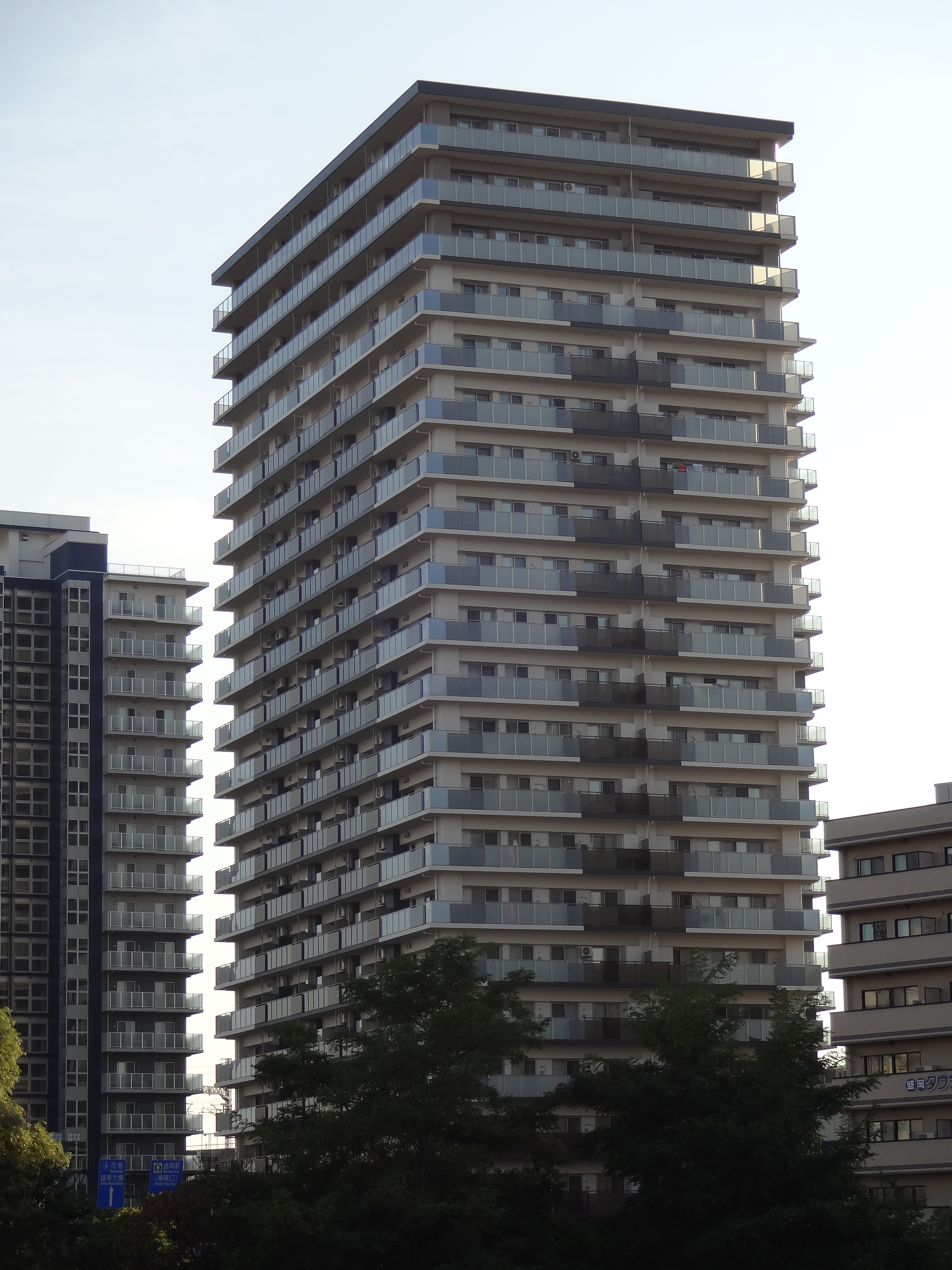 盛岡市の盛岡駅前に存在するタワーマンションです。